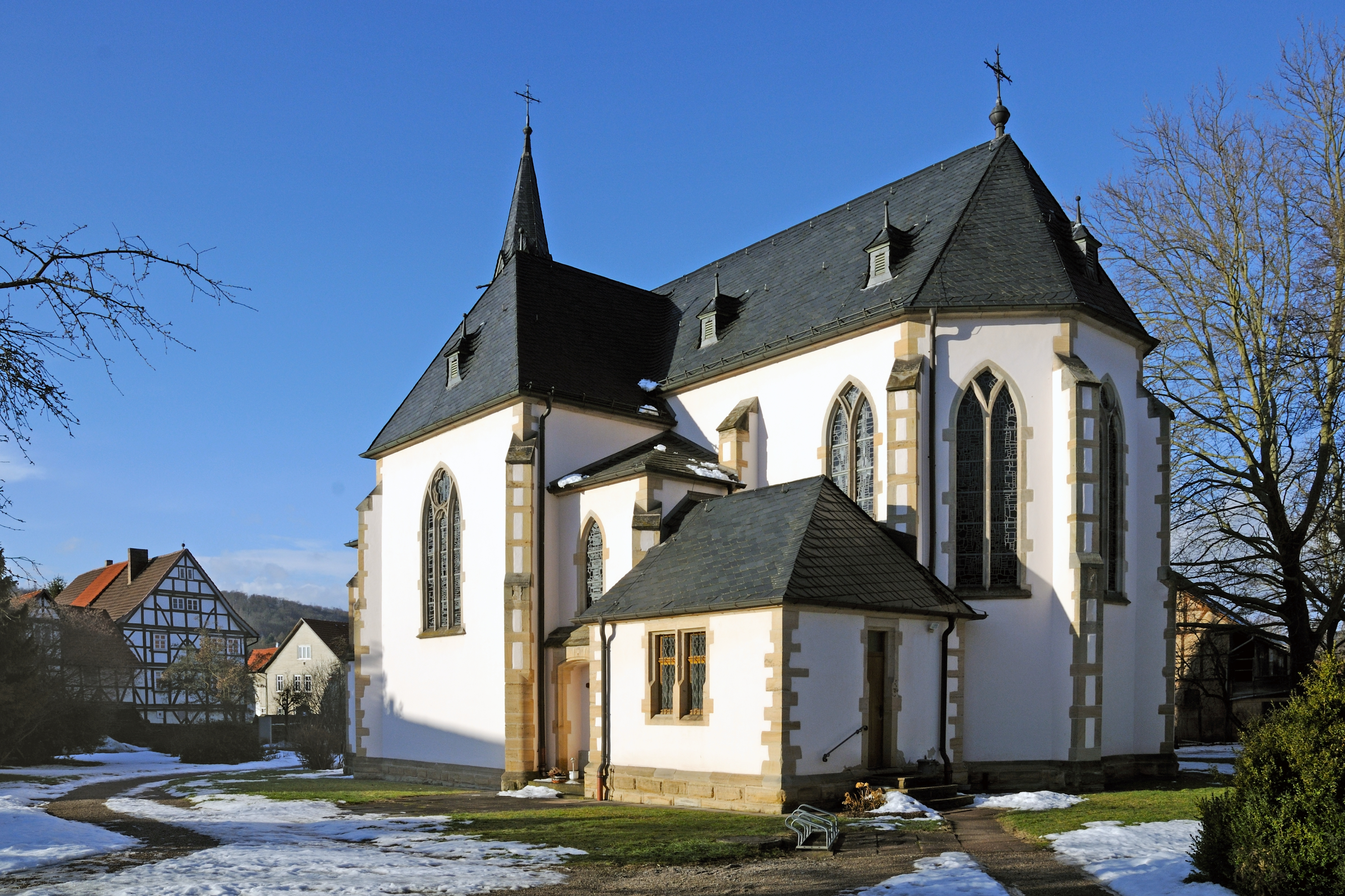 Kath. Stadtkirche Wanfried - Blick aus SüdOst